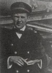 Ludwig Müller (1890-1918), čech, velitel ponorek v rakousko-uherském námořnictvu